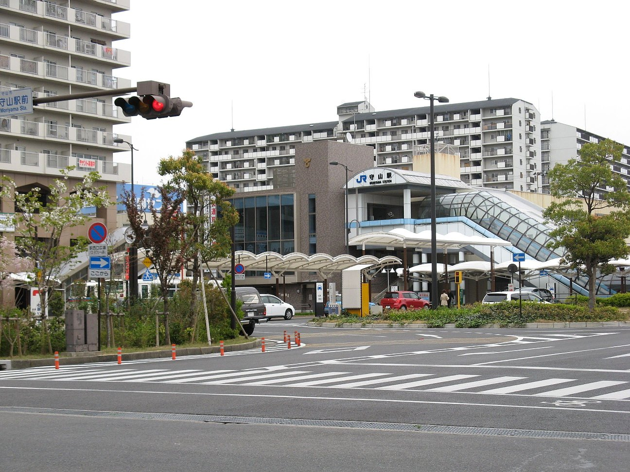 東海道本線守山駅 北口